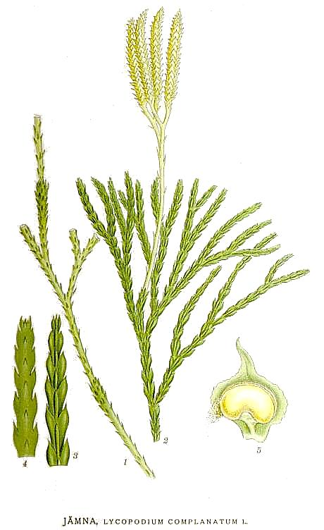 Original Description Jämna, Lycopodium complanatum L.